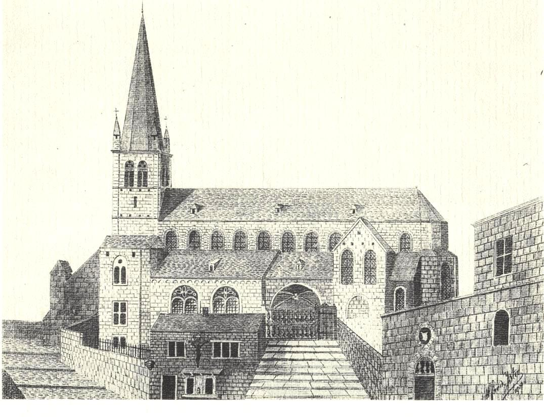 D' Collegiale Saint-Pierre vu Léck no enger Zeechnung vum Remacle le Loup (1738)